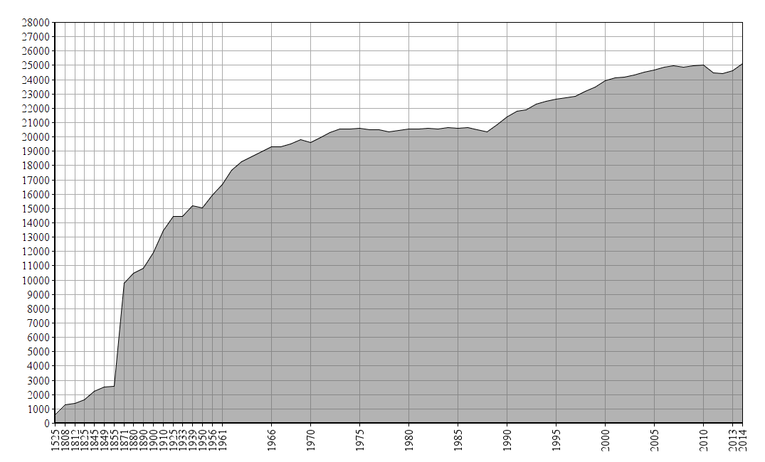 Dieses Bild zeigt die Bevölkerungsstatistik von Achern